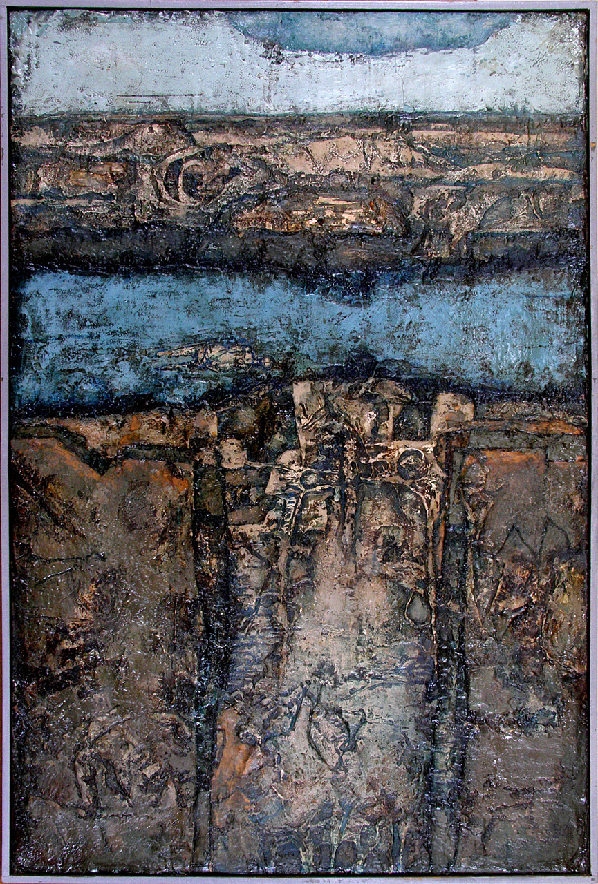 Zbyšek Sion, Řeka Styx, email a olej na plátně, 120x81 cm, 1960-63